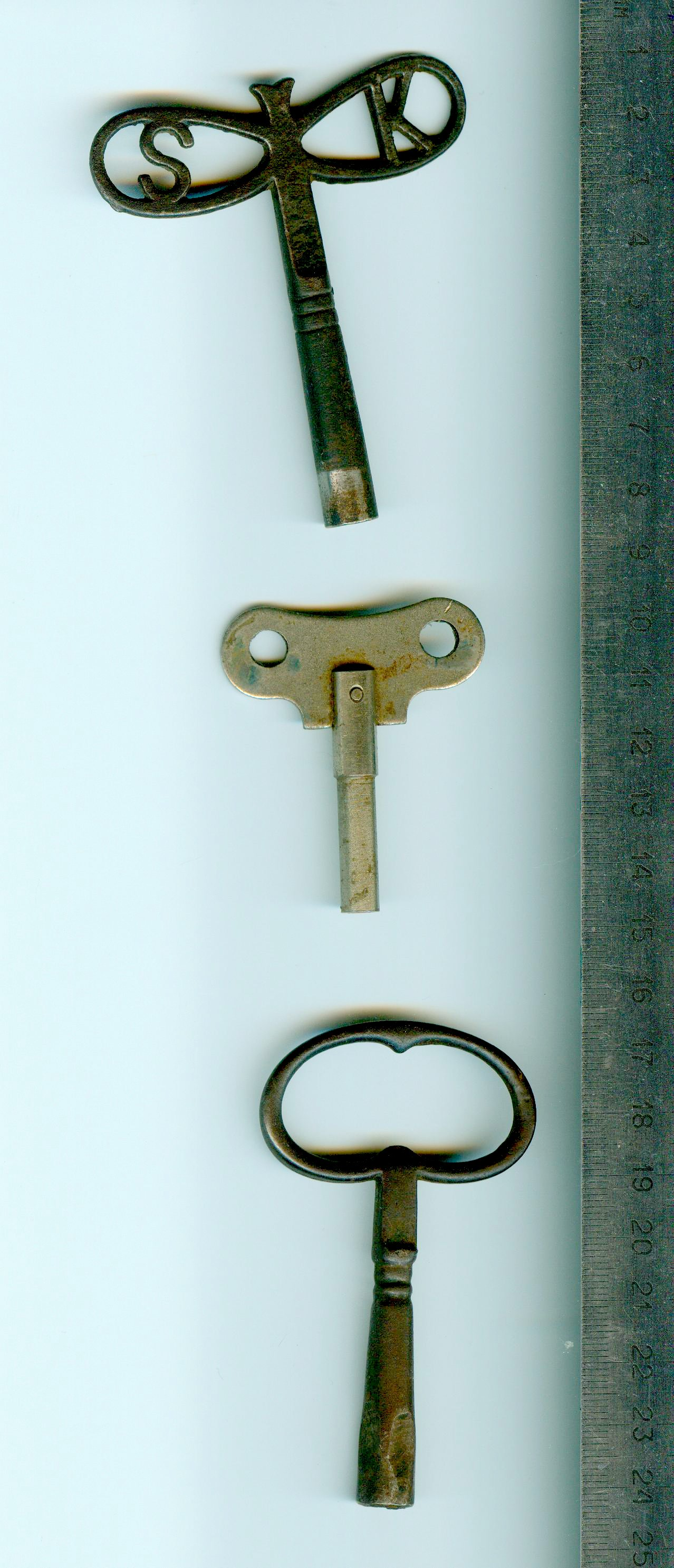 Klucz naciągowy nakładany do nakręcania zegarów